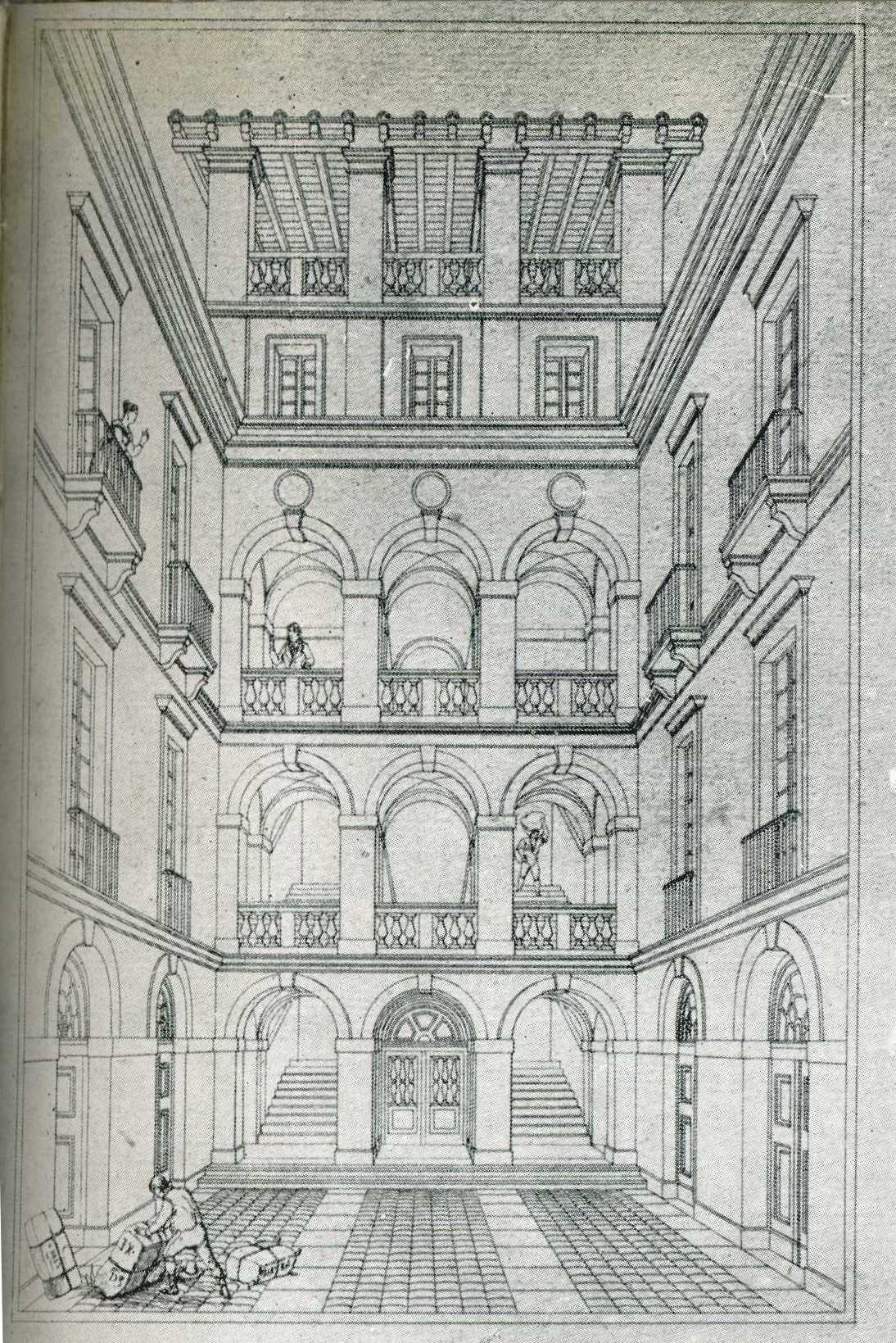 palazzo